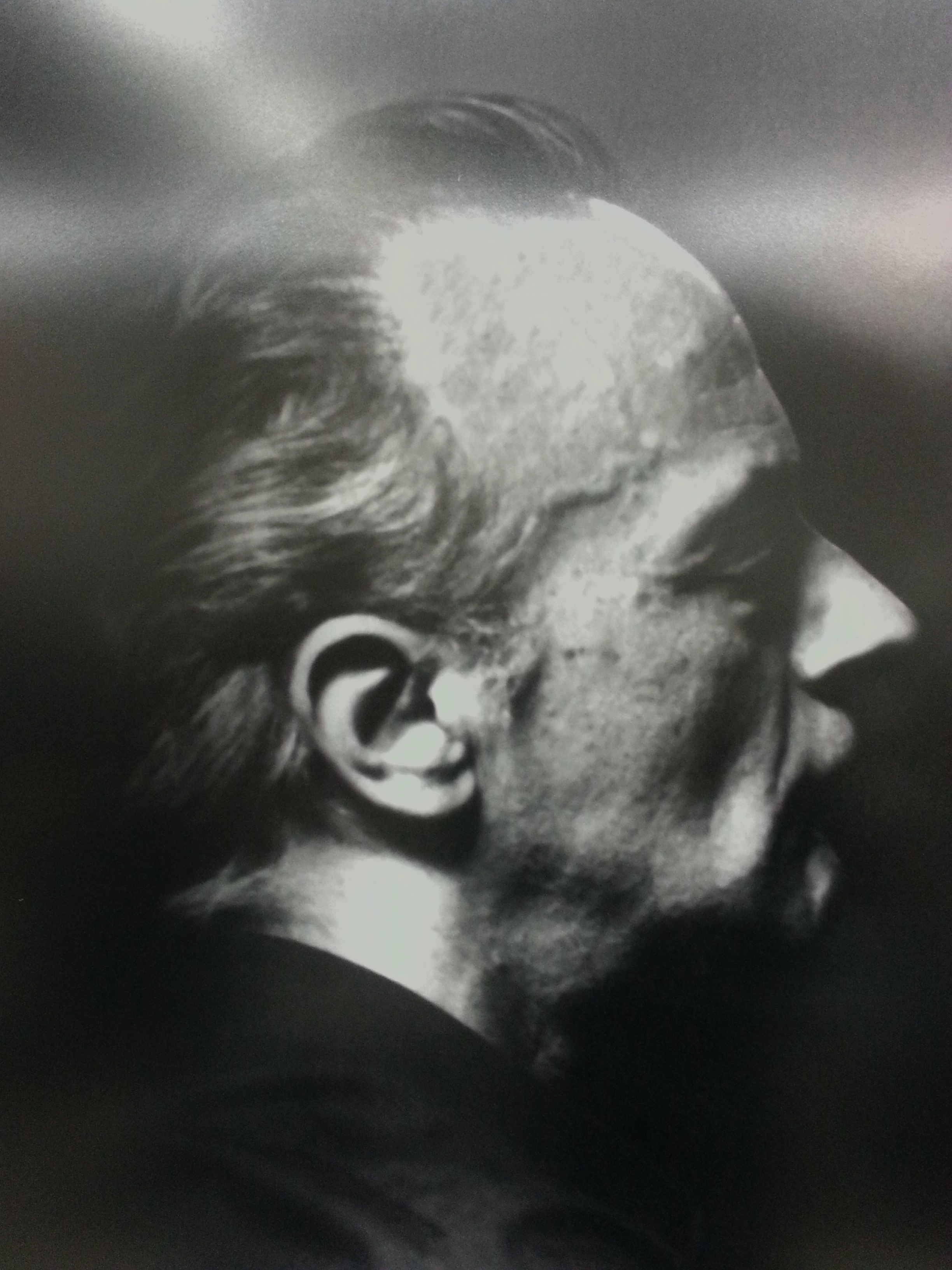 Imagen de Lucio Gera, detalle del cuadro en su homenaje ubicado en el aula magna “Lucio Gera” de la Facultad de Teología de la Pontificia Universidad Católica Argentina. Buenos Aires, Argentina.